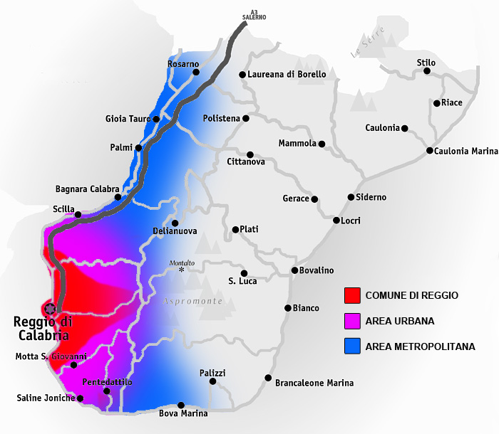 Mappa dell'area urbana e dell'area metropolitana di Reggio Calabria